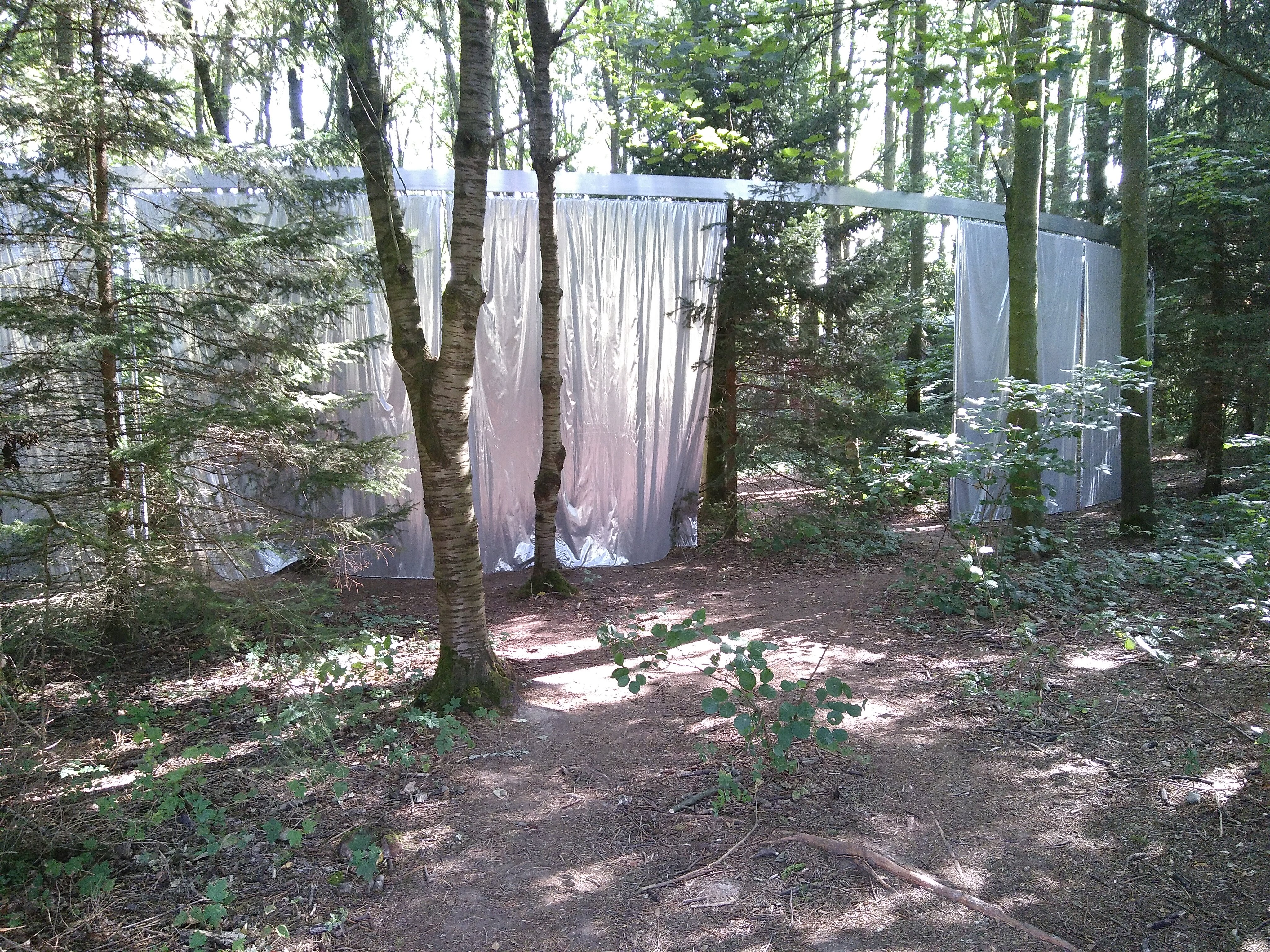 Werk van het architectenbureau OFFICE Kersten Geers David Van Severen en fotograaf Bas Princen